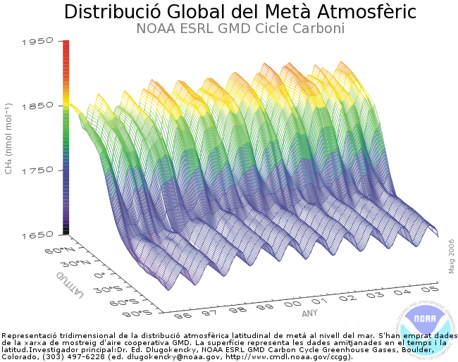 Aquest gràfic exposa el resultat de les observacions de metà des de 1996 a 2005 que mostren l'augment del metà, les variacions estacionals i la diferència entre els hemisferis nord i sud.